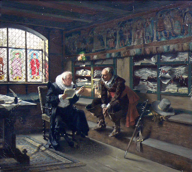 Beim Notar; im Stil des 17.Jhdts.; Öl auf Leinwand, 54 x 59 cm; signiert